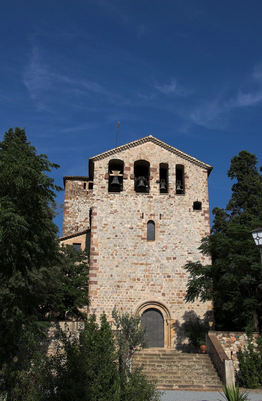 Església de Santa Maria de Llerona (les Franqueses, Vallès Oriental, Catalonia, Spain) Romànic / Románico / Romanesque s.X.